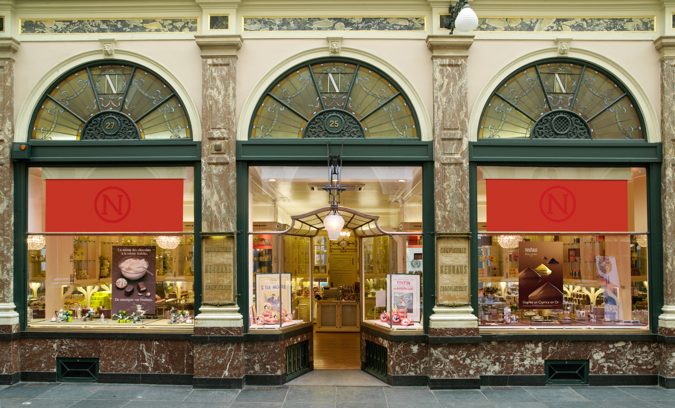 Neuhaus-winkel in de koninginnegalerij